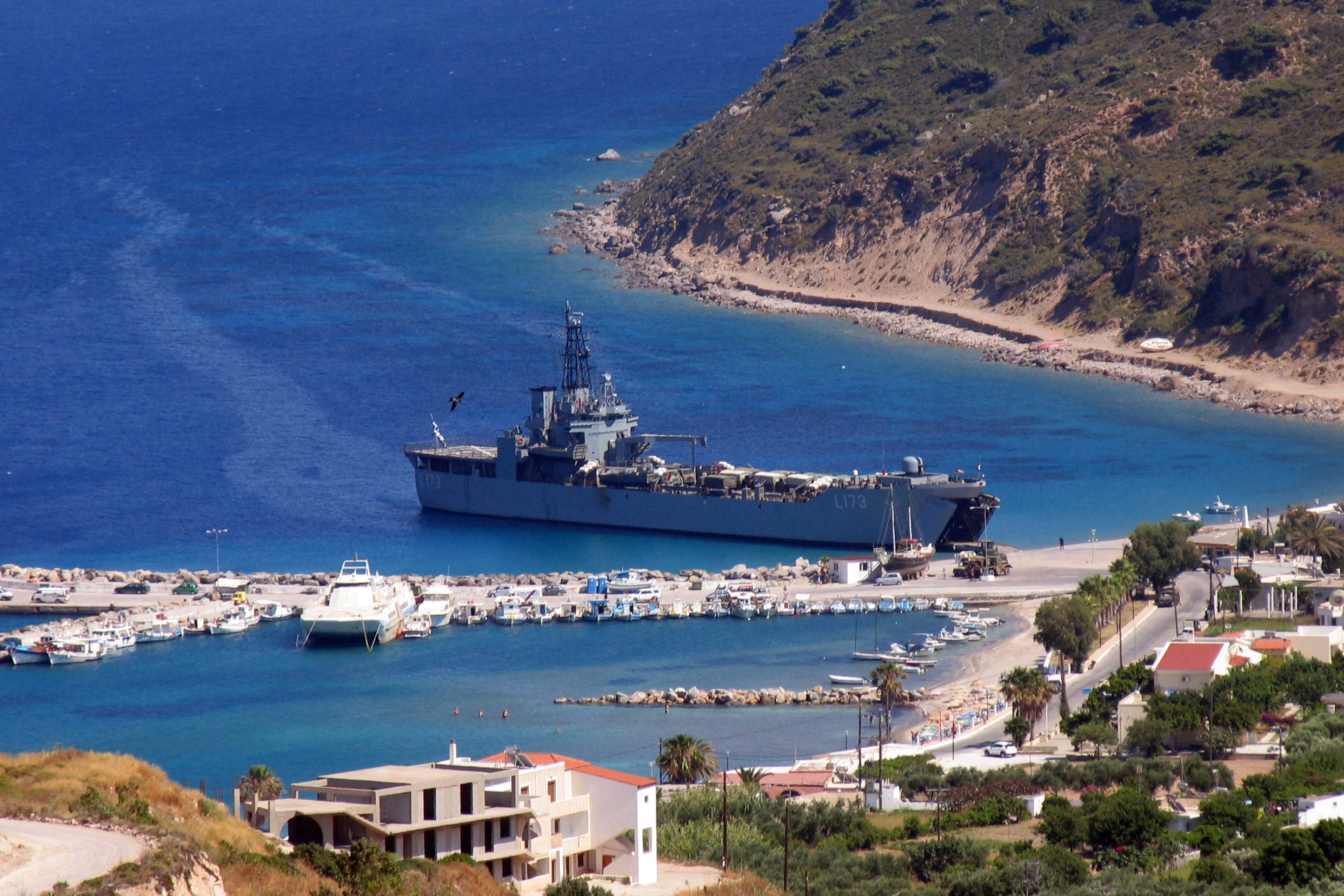 Десантный корабль Chios (L173) разгружается на причал города Камари на острове Кос.